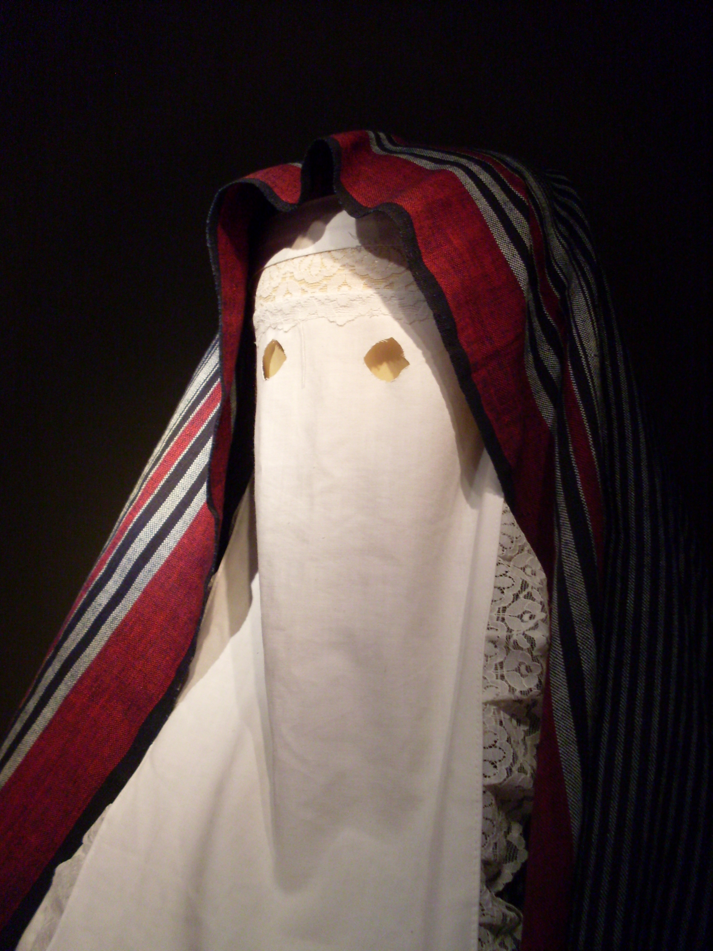 Tunisie, Djerba, Musée du patrimoine traditionnel